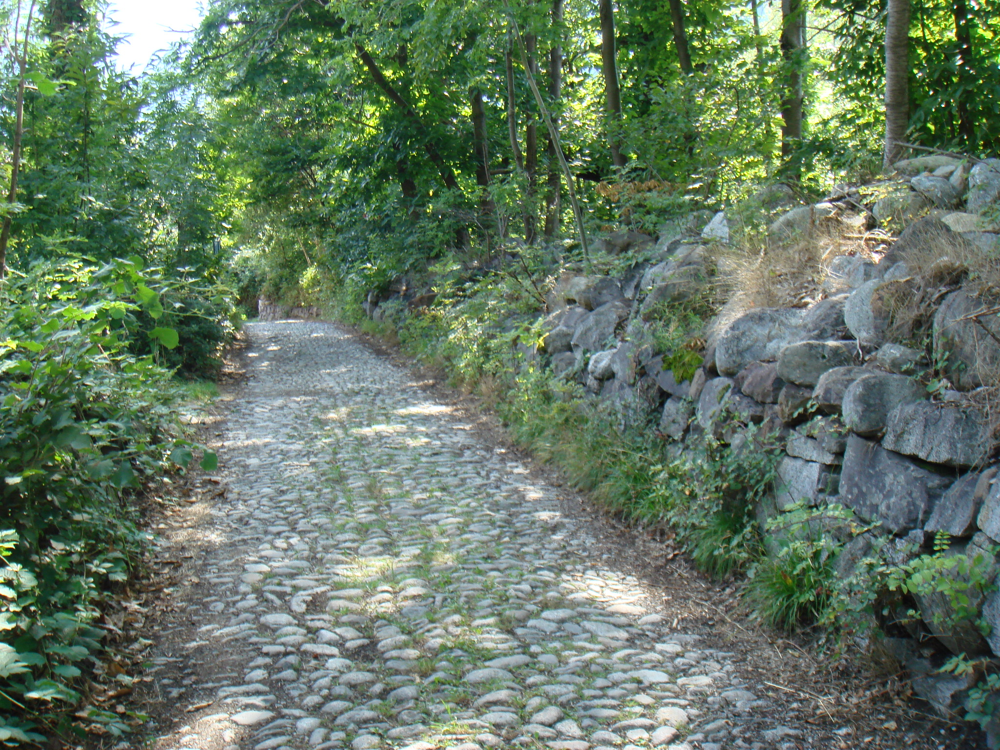 Rino di Sonico: Frazione del Comune di Sonico in Provincia di Brescia. Via ègia, Strada vecchia. Sentiero che da Rino di Sonico porta in Val Malga. Foto di Stefano Bolognini 14 agosto 2007.